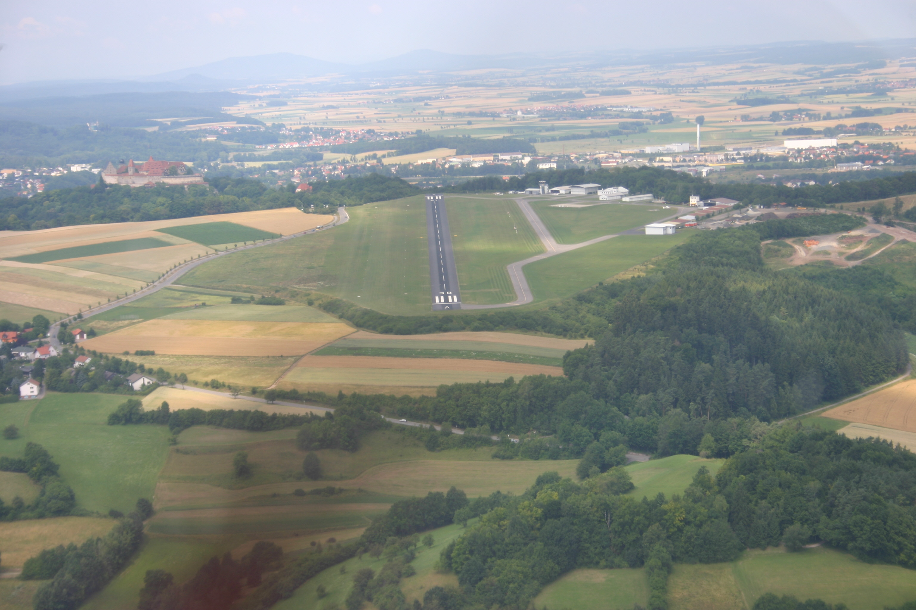 Flugplatz Coburg Brandensteinsebene im Anflug auf die Piste 30